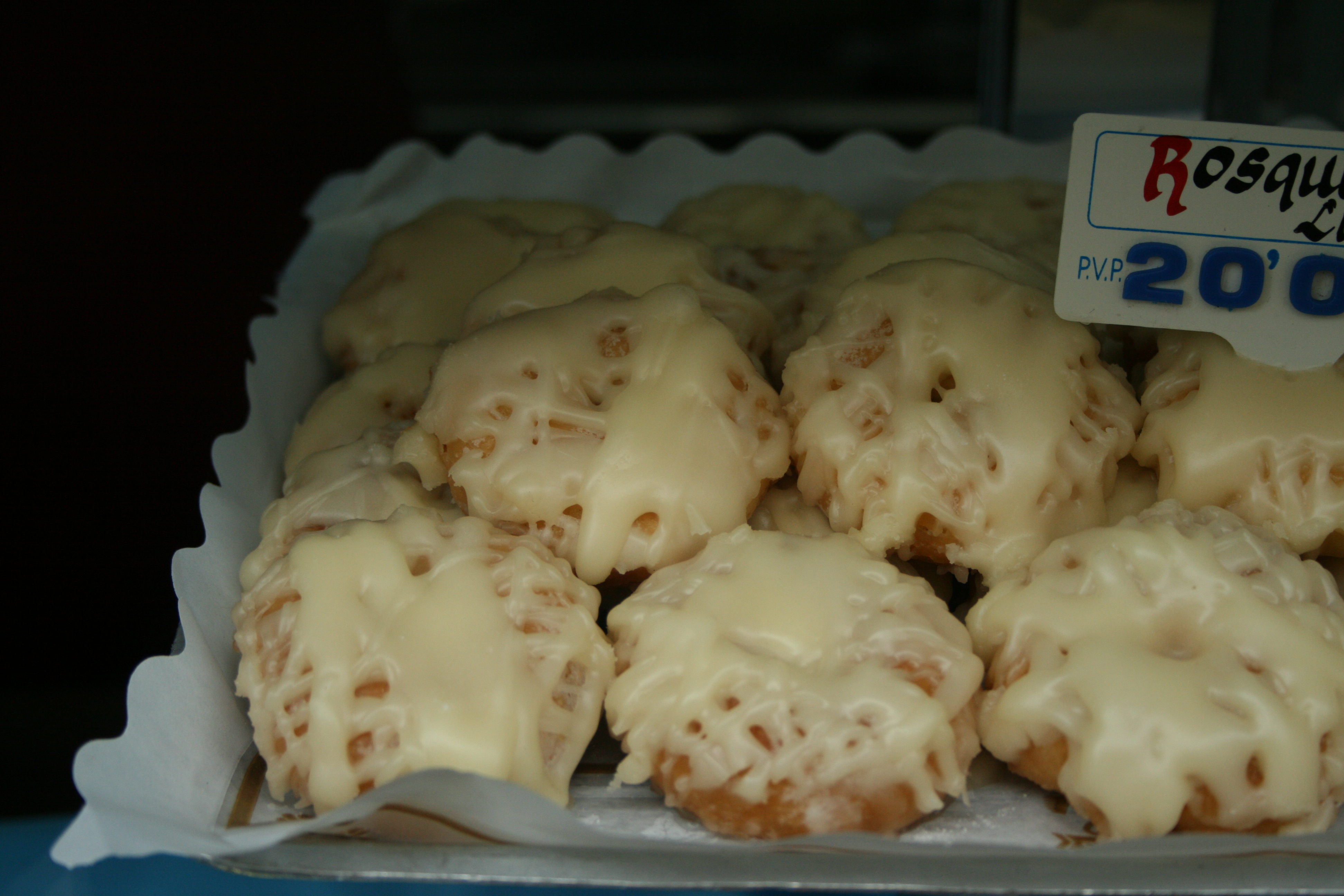 Rosquillas listas - Cocina de Madrid